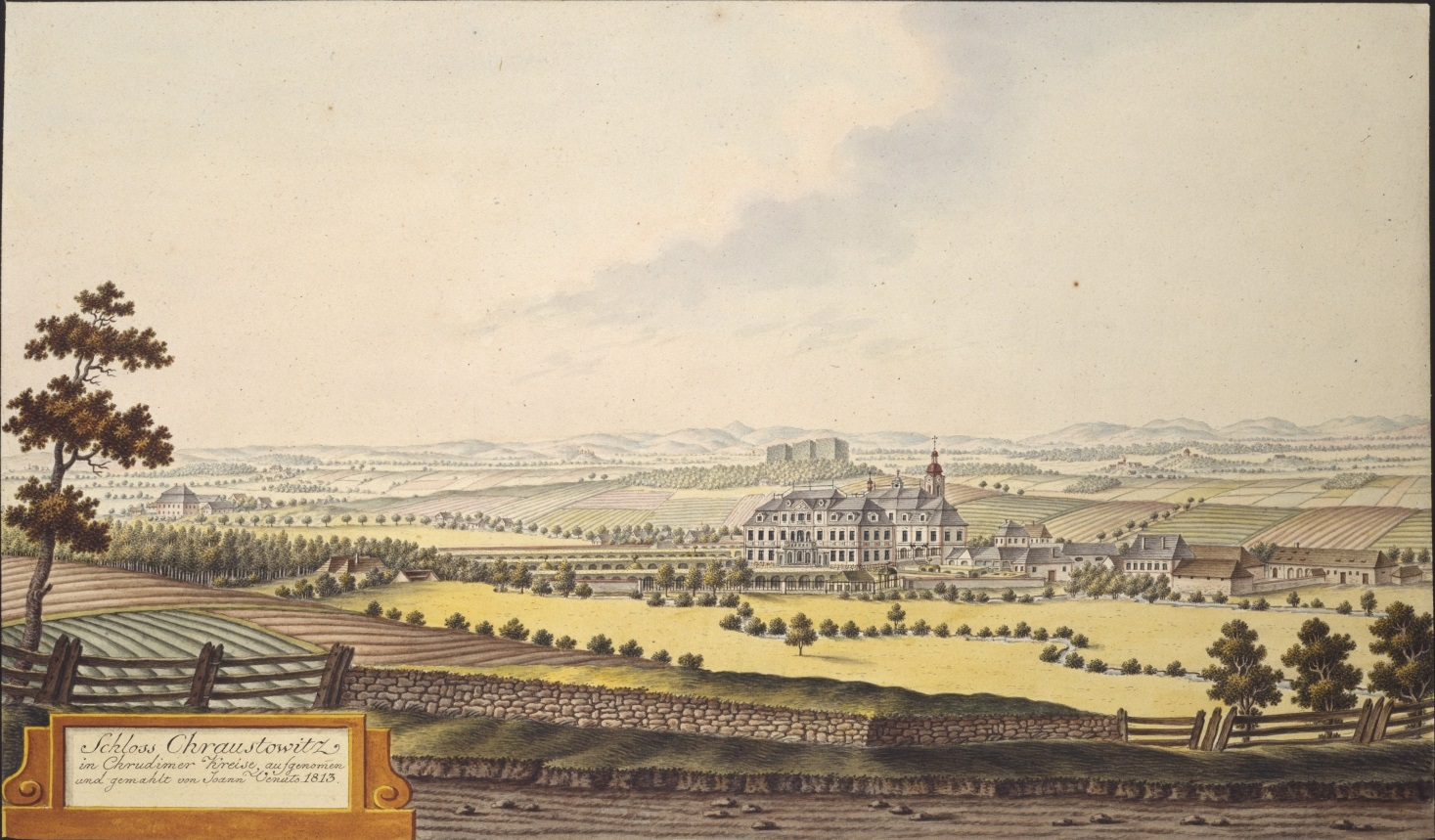 Chroustovice - Schloss Chraustowitz in Chrudimer Kreise, aufgenommen und gemahlt von Joann Venuto 1813